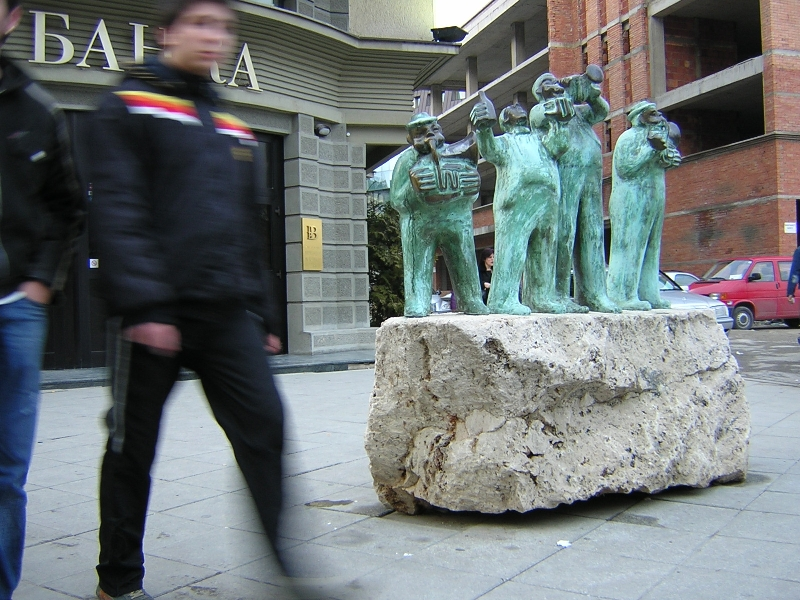 Skopje,Macedonia